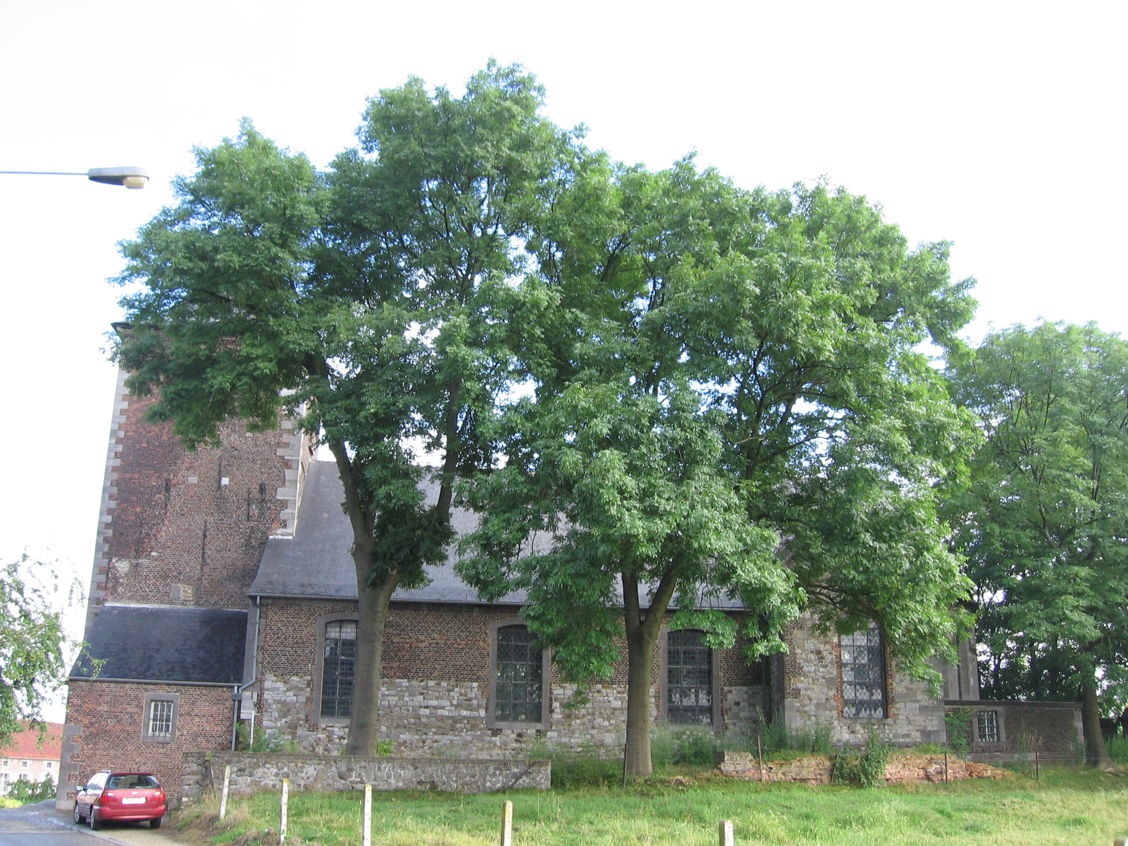 Eglise Saint-Barthélemy de Heppignies (commune de Fleurus), au nord de Charleroi (Belgique)